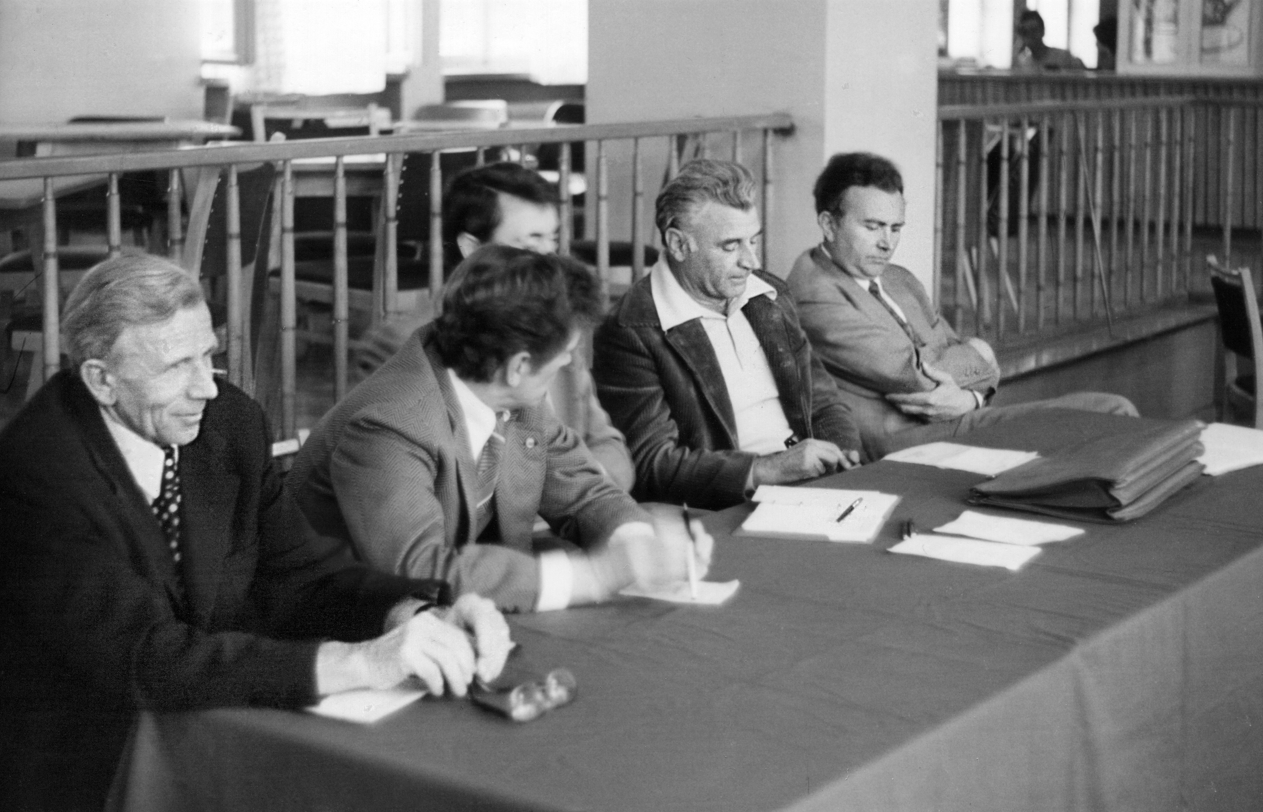 Professoren der TU Dresden, Sektion Informationstechnik: Prof. Klaus Lunze (links), Prof. Gerhard Wunsch (2. von rechts), Prof. Eberhard Krocker (rechts). Bei einem Podiumsgespräch am 8. Juni 1977 im Studentenwohnheim der TU Dresden, Güntzstraße 28